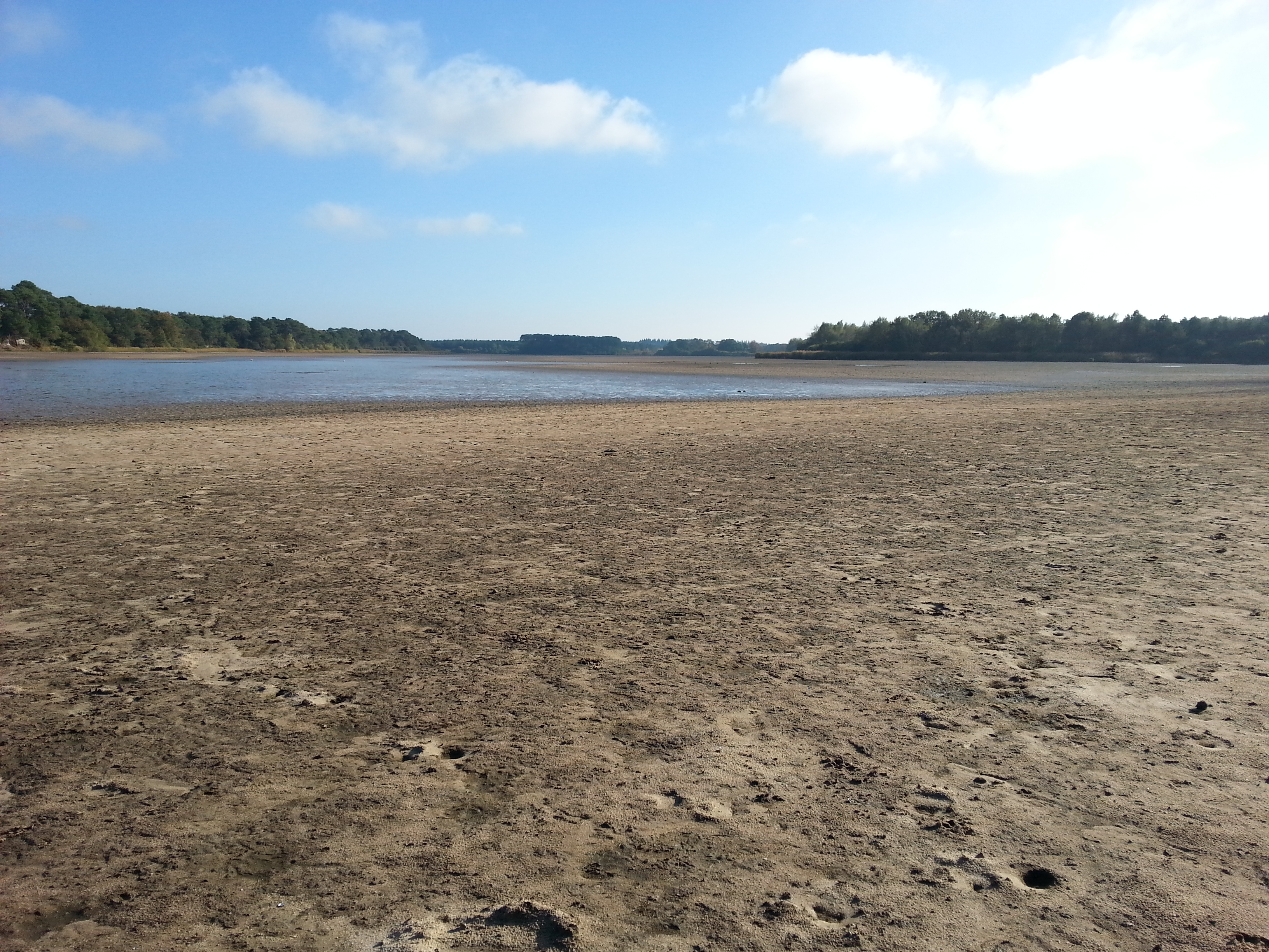 Vidange de l'étang de Bellebouche, dans la Brenne, à Mézières-en-Brenne (36).